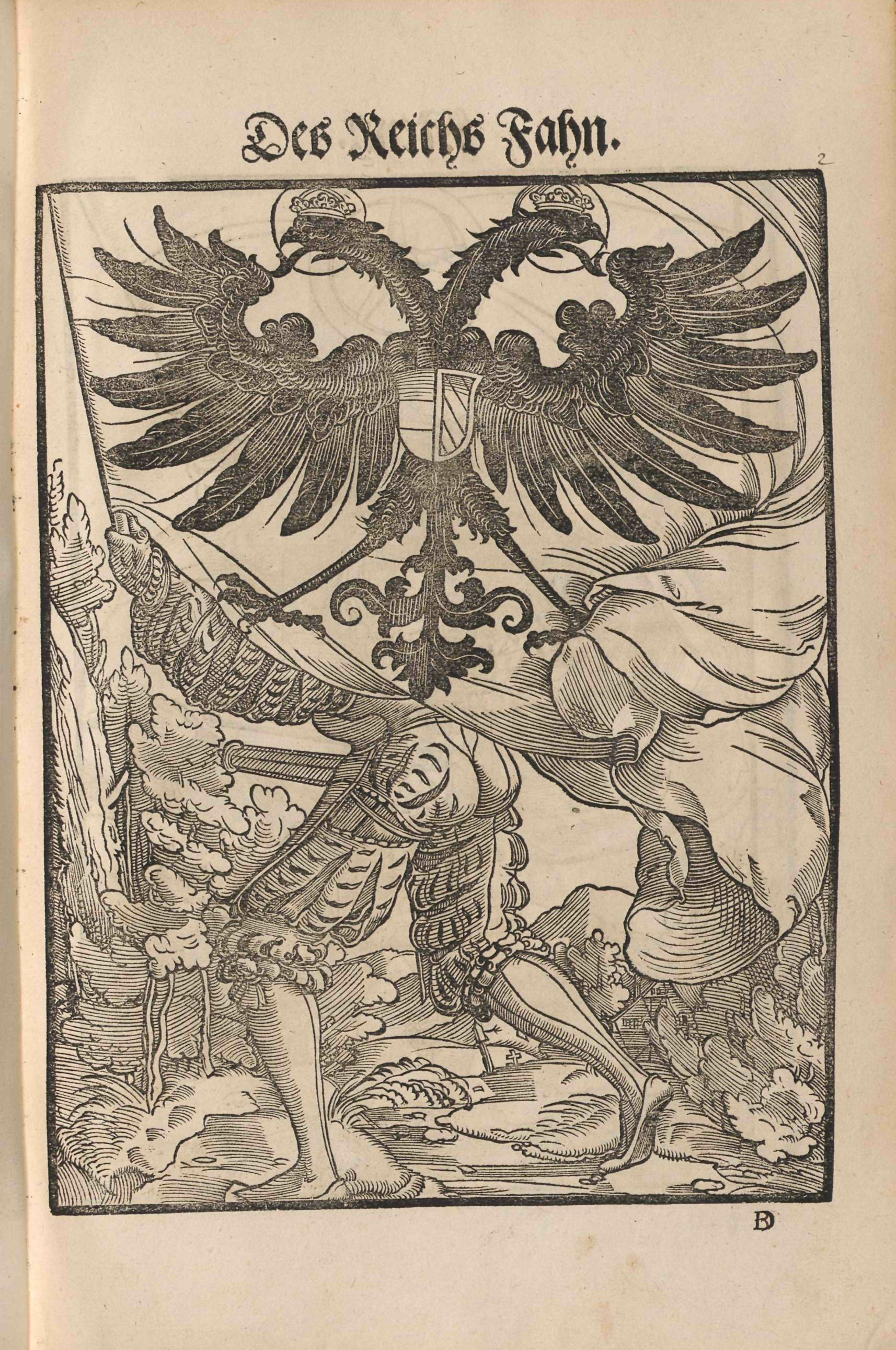 Jacob Koebel (Vorrede): Wapen. Des Heyligen Römischen Reichs Teutscher nation. Gedruckt bei Cyriacus Jacob (evtl. auch Herausgeber/Autor), Frankfurt am Main 1545, Holzschnitte von Jacob Kallenberg. Zu Angaben zur Tingierung (Farbgebung) der Wappen siehe das Register ab Bild Nr. 165. Des Reichs Fahn.